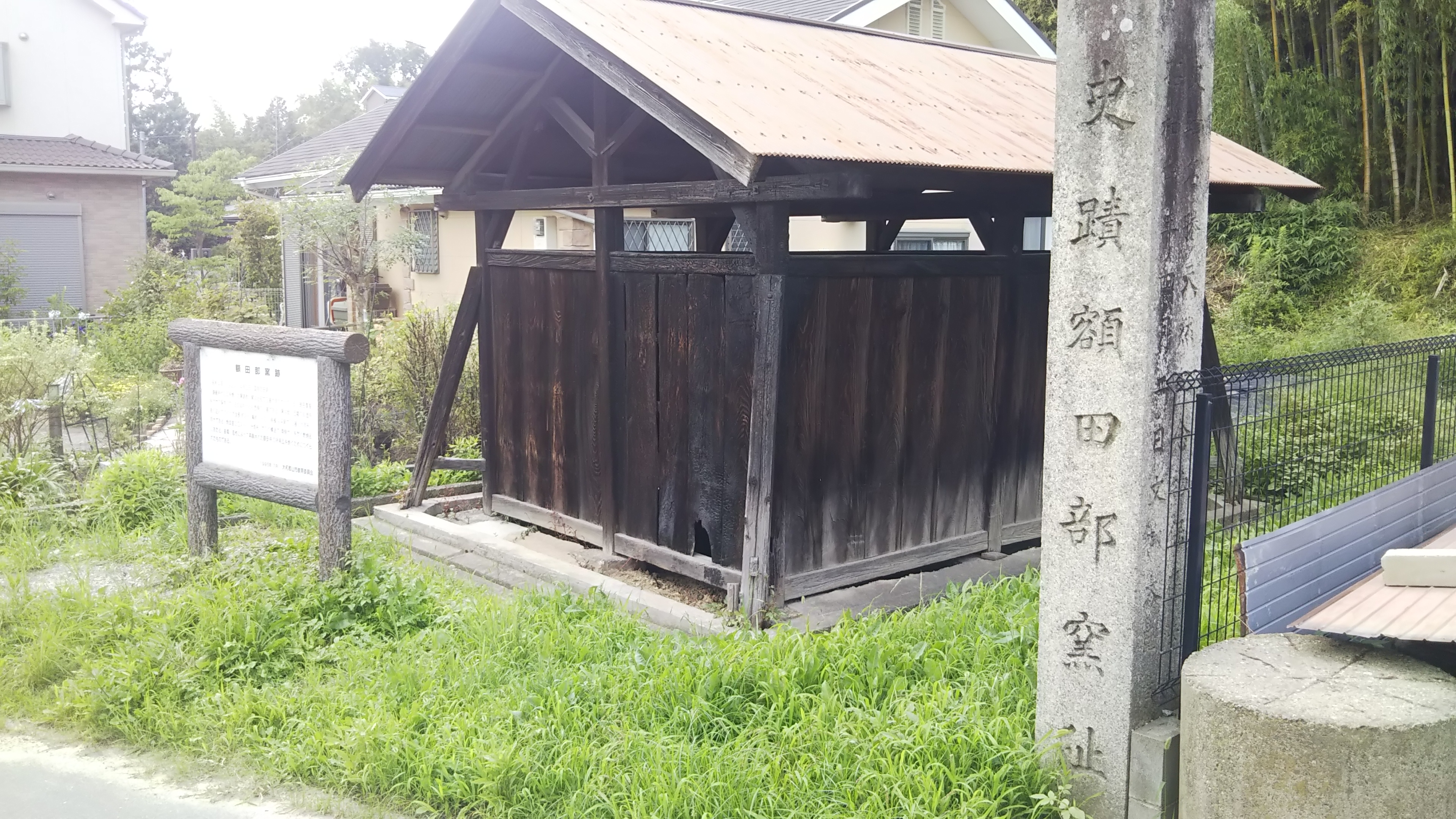 額田部窯跡現状